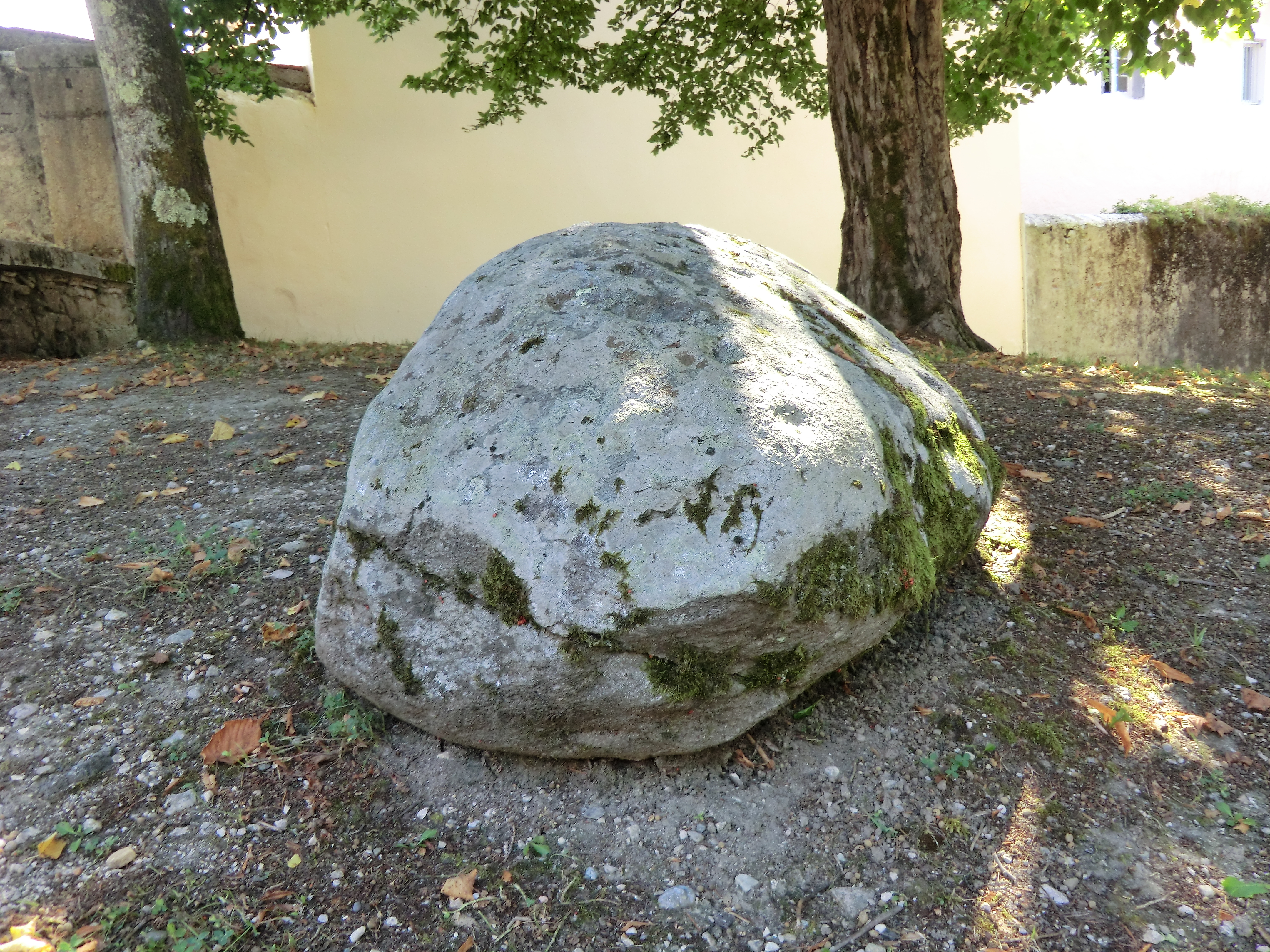 Pierre à cupules de Magnieu (Belley).